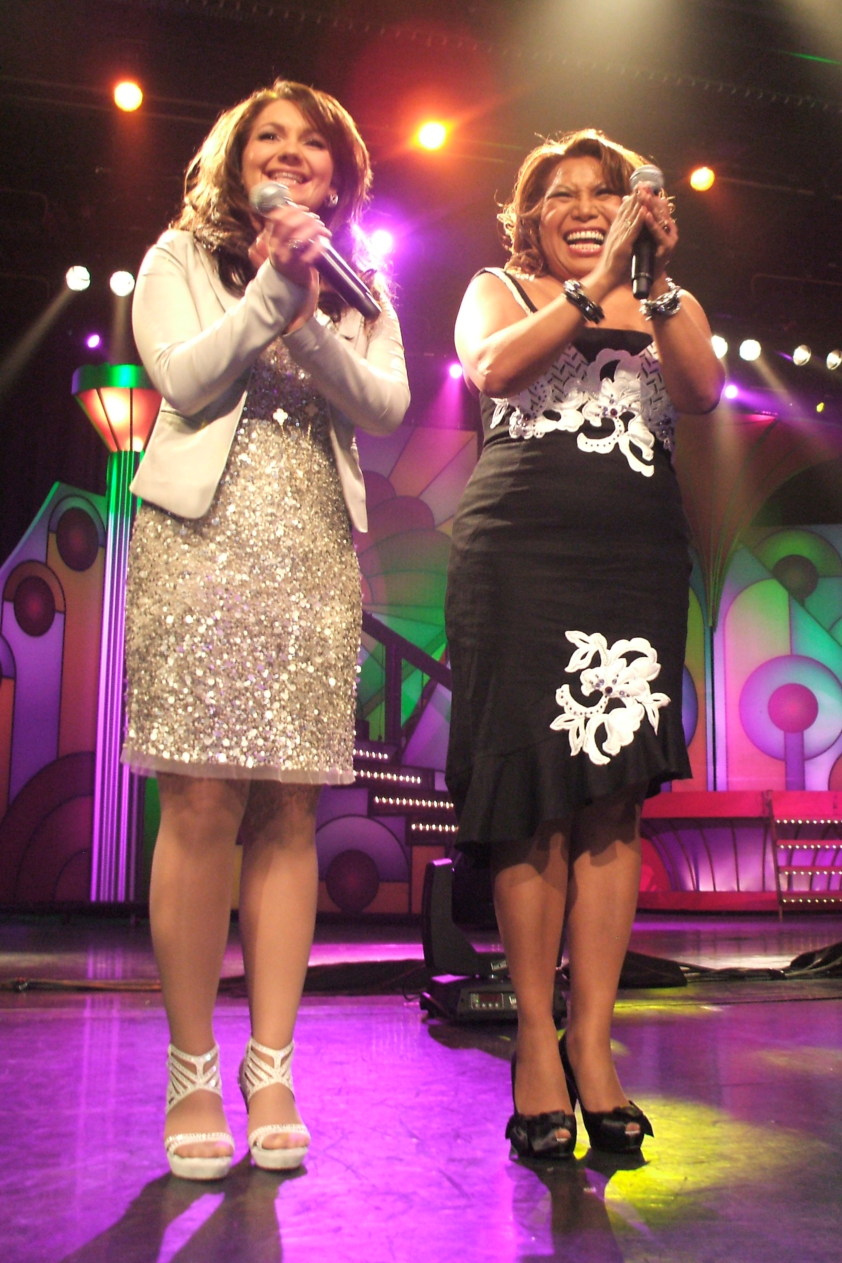 Pauzenummer tijdens het Nationaal Songfestival 2011 Sieneke & Justine Pelmelay